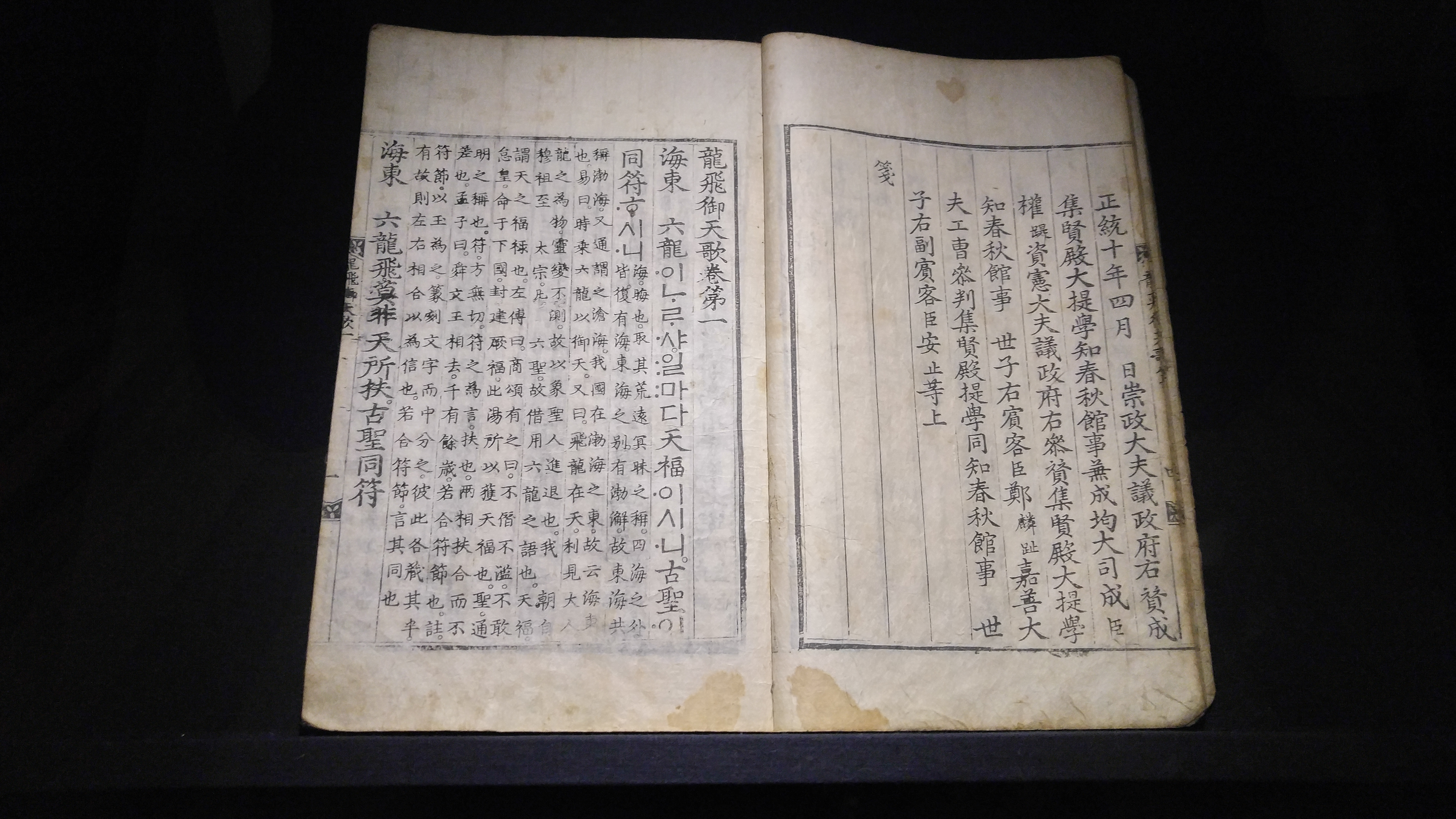 용비어천가 (1)